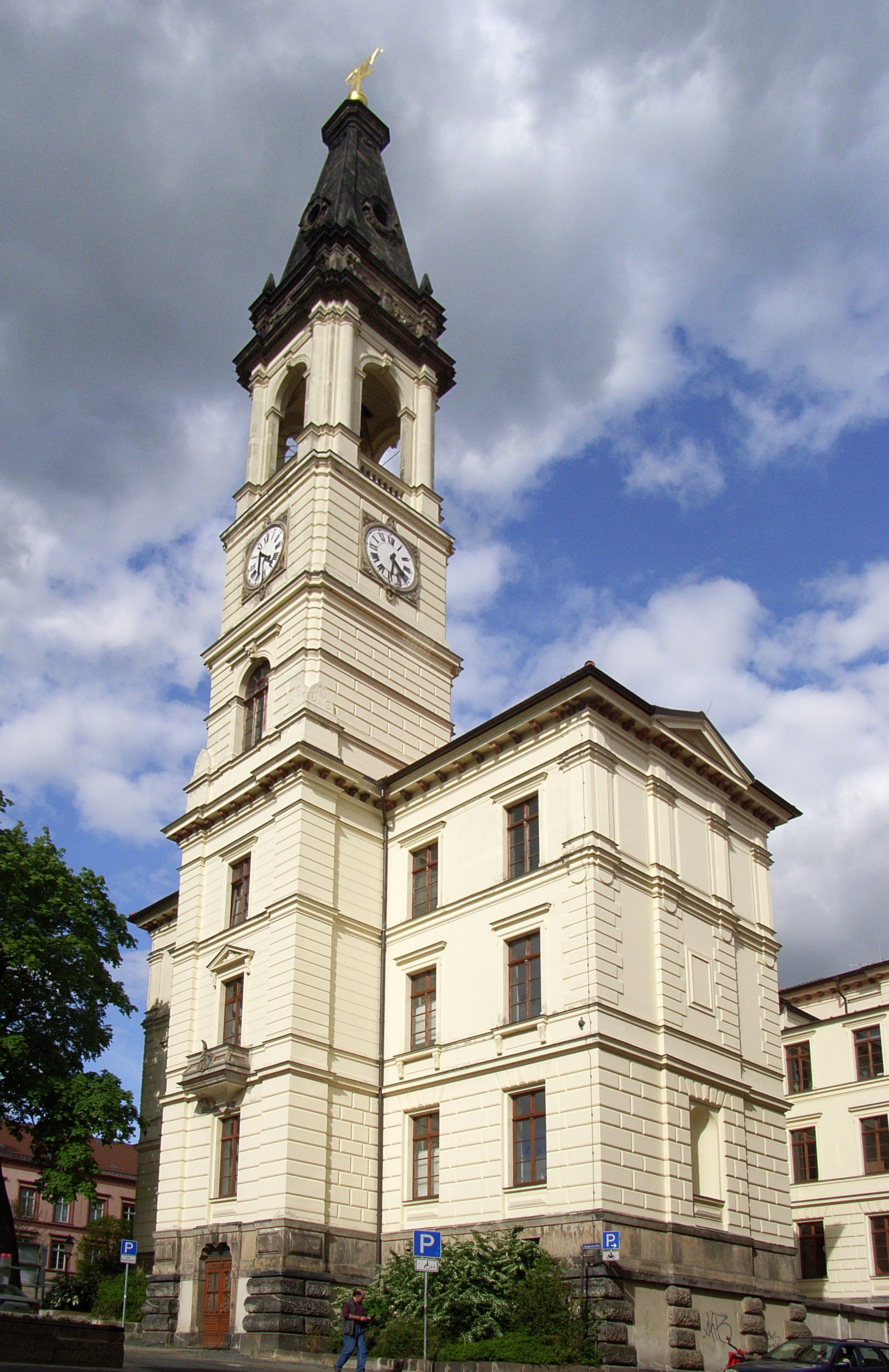 das zittauer Christian-Weise Gymnasium (keine Kirche!)